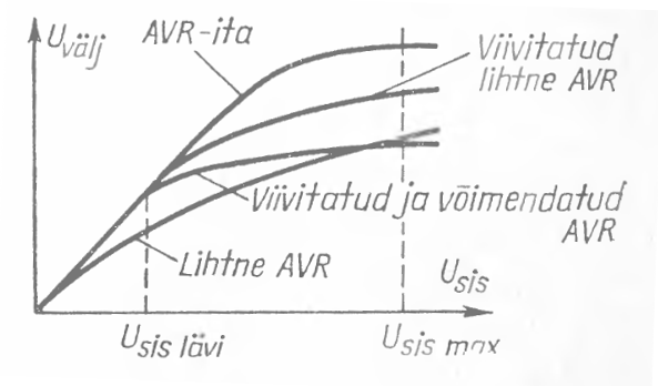 Erinevate AVR-ide sisendi-väljundi sõltuvused